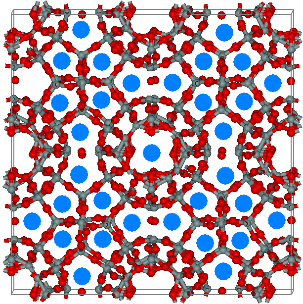 Структура на меланофлогит Червено - кислород Сиво - силиций Синьо - ксенон